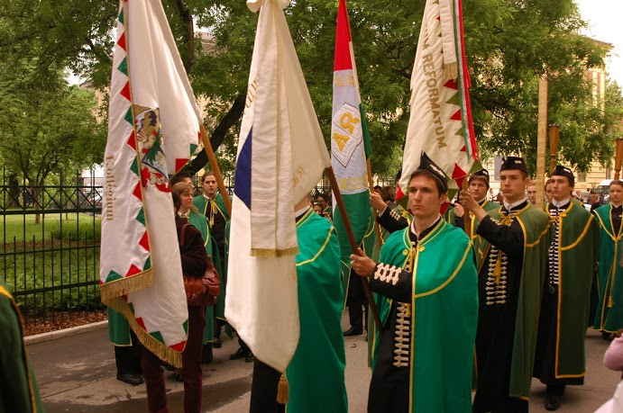 A Debreceni Református Kollégium diákjai: tógát viselő gimnazista (sötétebb) és egyetemista (világosabb) diákok 2013-ban